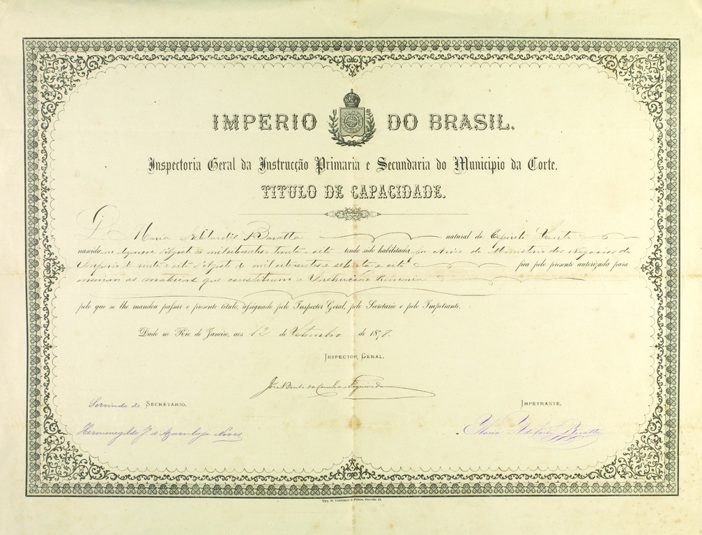 Fundo Diversos – SDH.